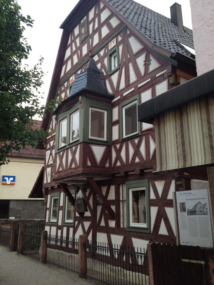 Alfeldsches Haus in Mosbach-Neckarelz